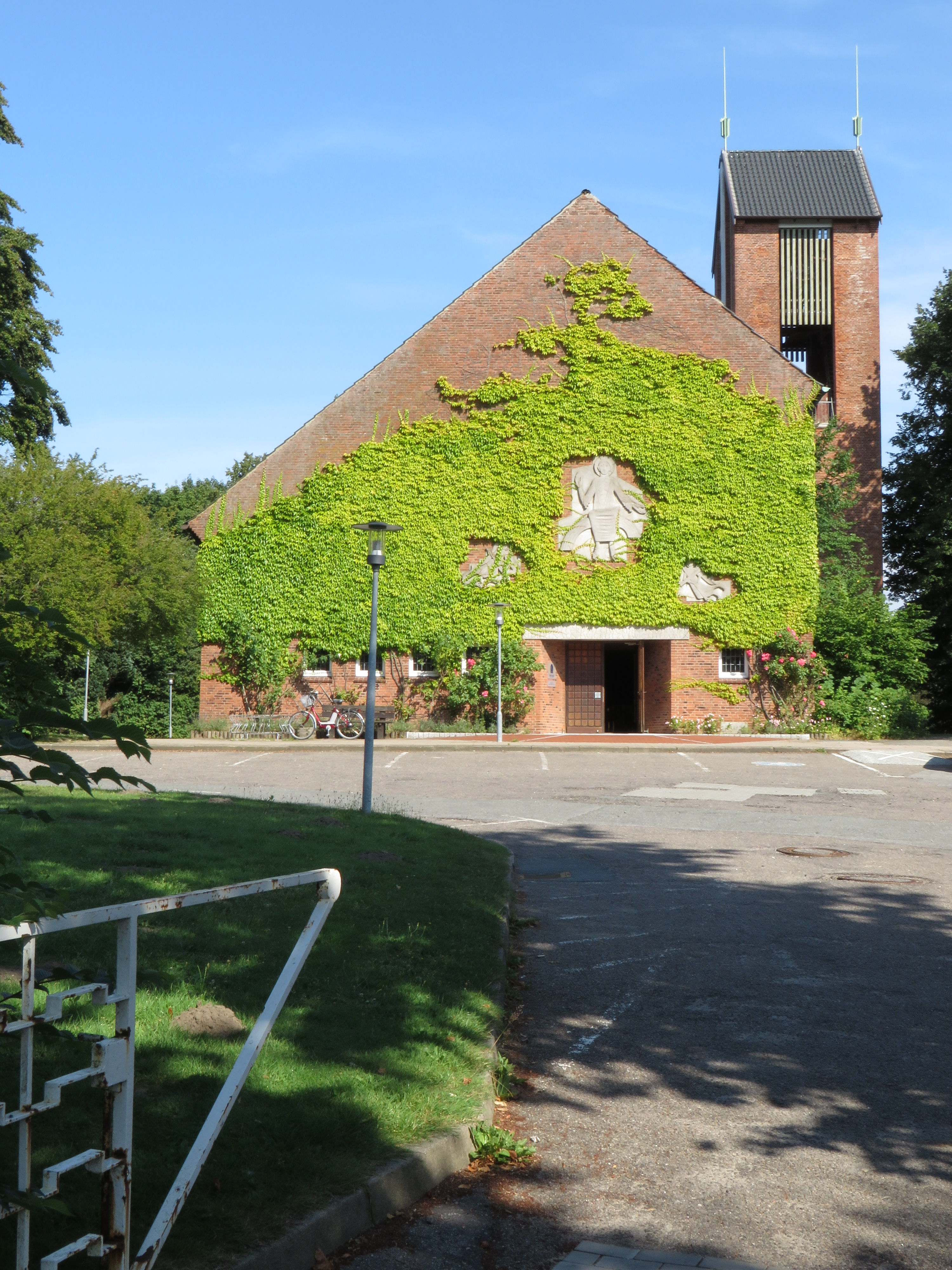 Christuskirche (Flensburg-Mürwik, Juli 2014), Bild 04